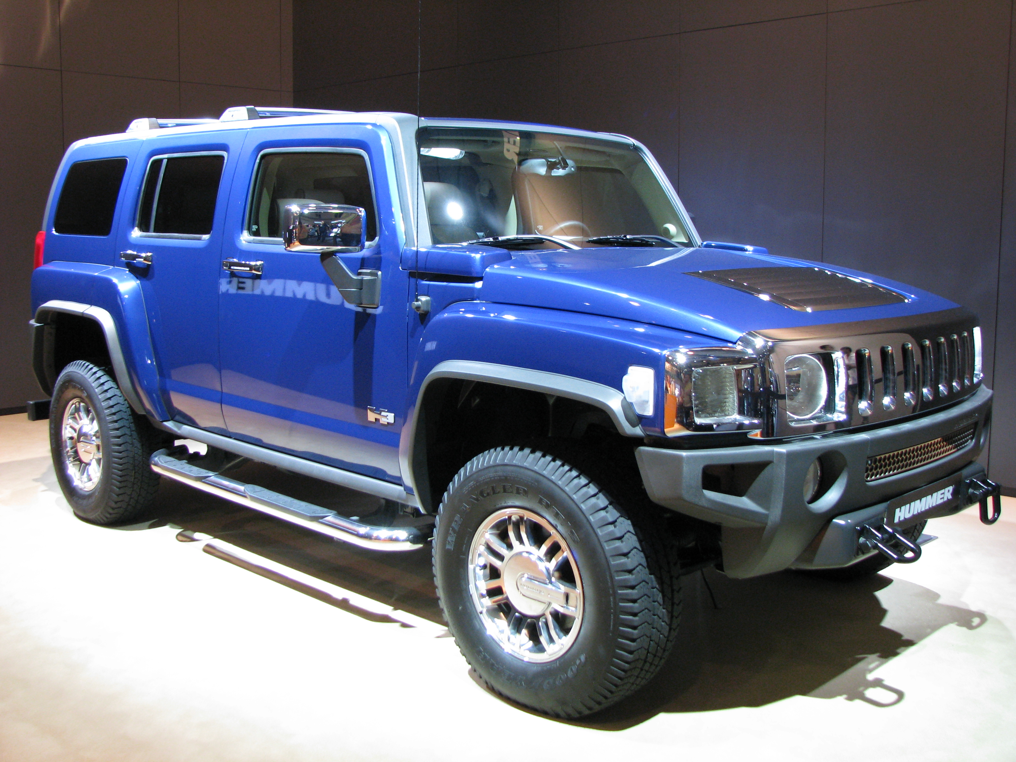 Hummer H3 expuesto en el Salón Internacional del Automóvil de Barcelona 2009